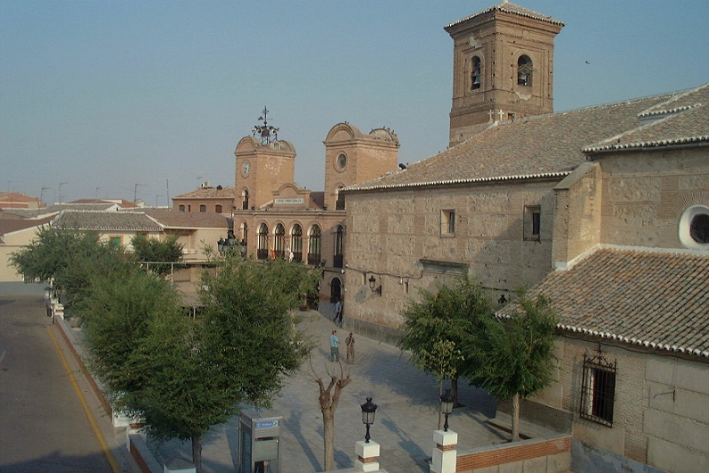 Panorámica de la plaza de España